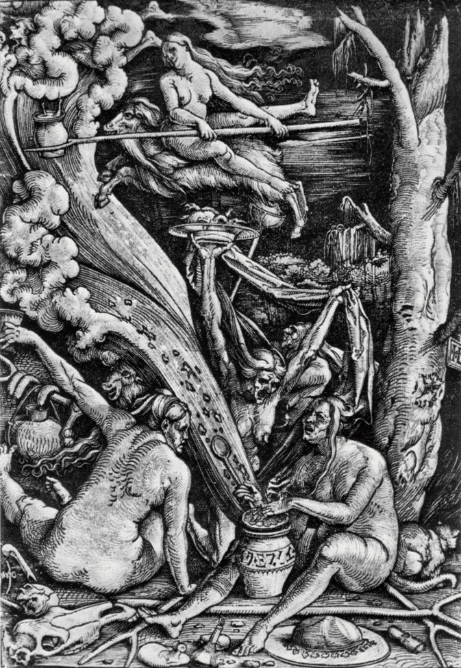 Pentekening Graphische Sammlung Albertina, Wien.